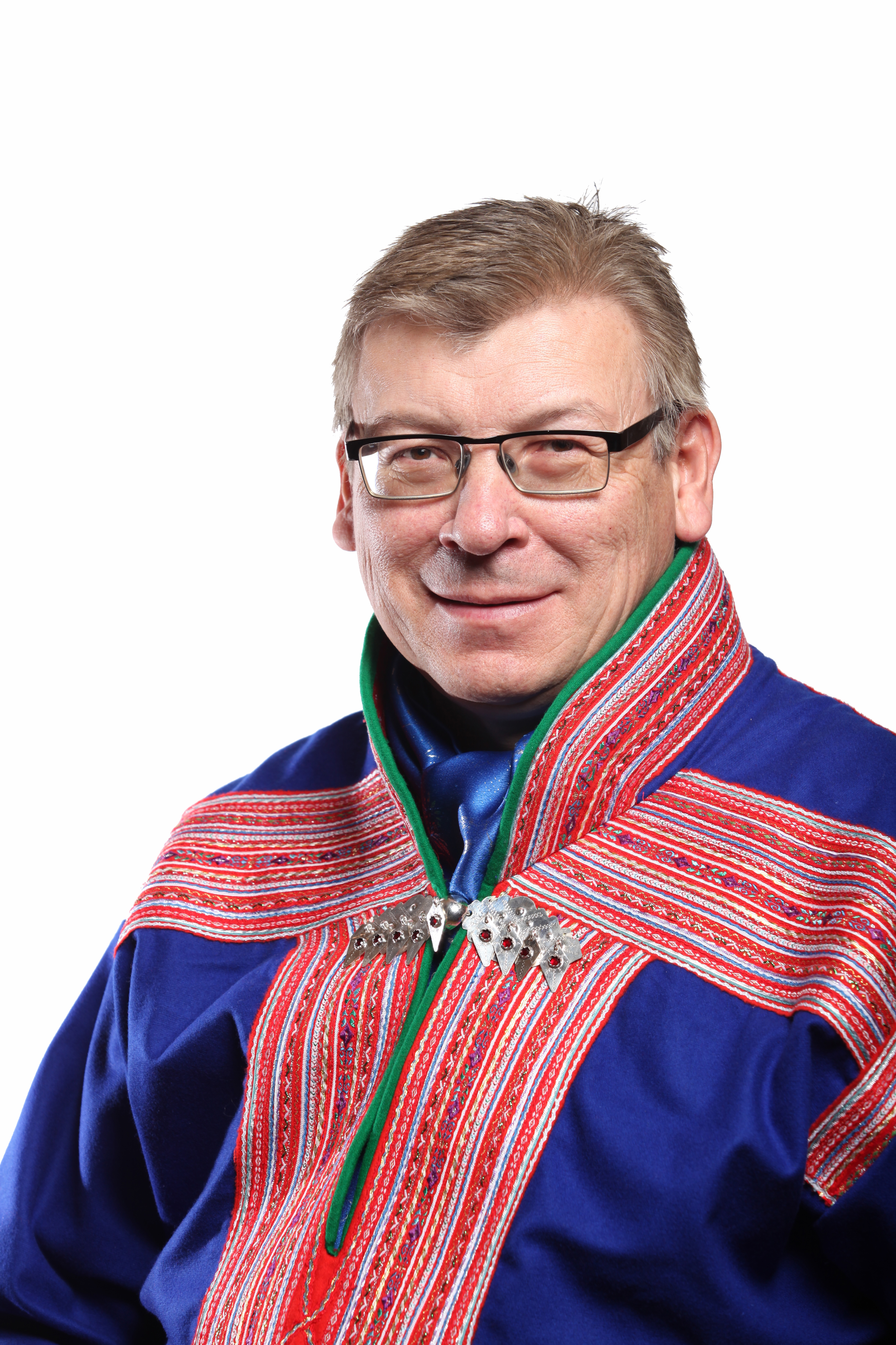 Medlem av næring- og kulturkomitéen. Foto: Kenneth Hætta / Sametinget.